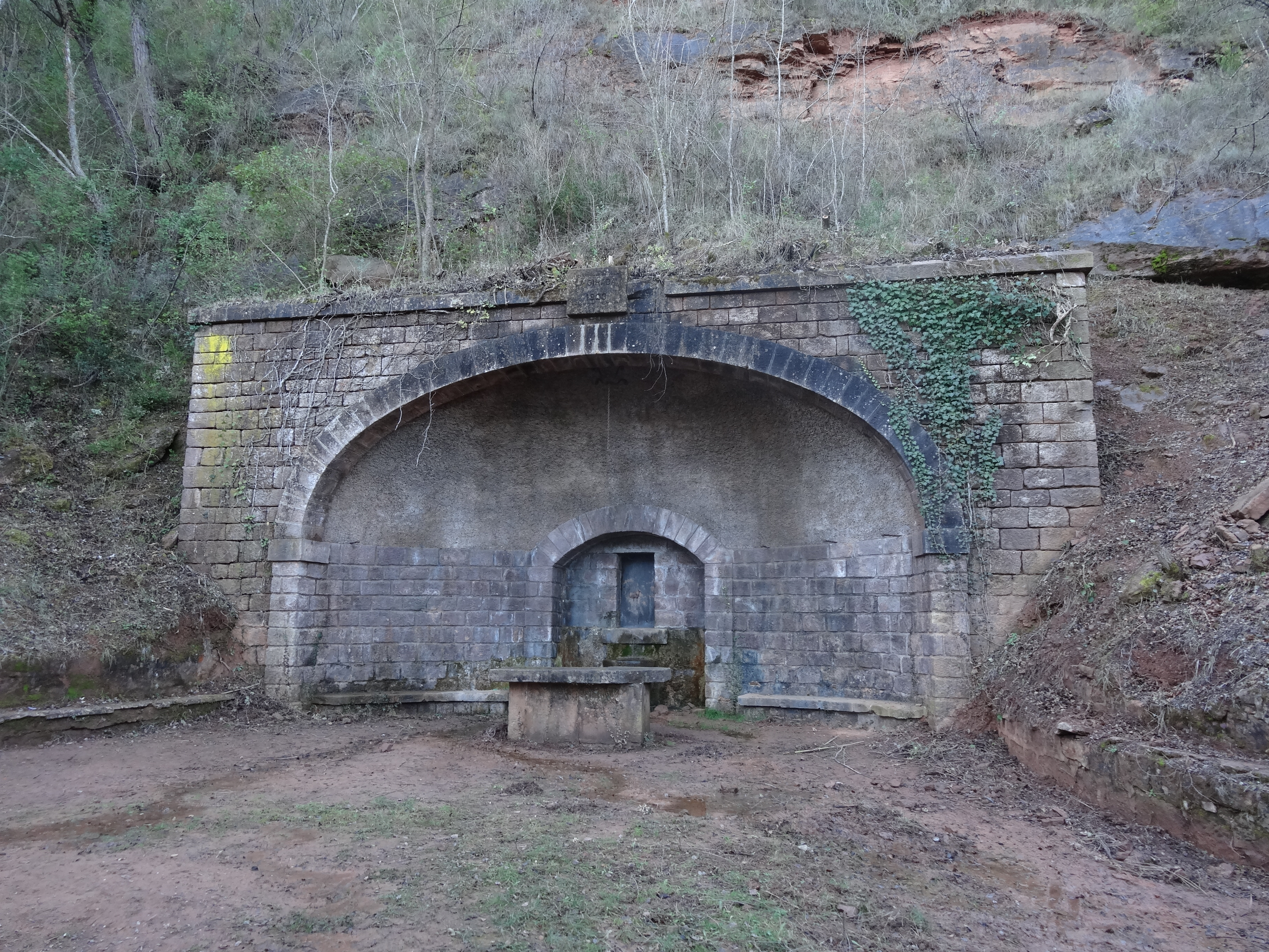 Font de la Girada, Monistrolet (desembre 2012)